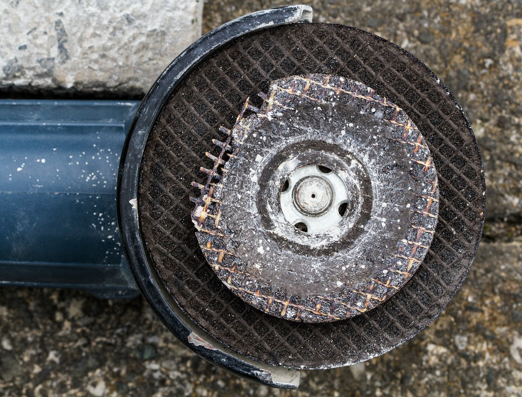 Zwei Trennscheiben eines Einhandwinkelschleifers für das Freihand-Trennen von Steinplatten - oben lose liegend: verschlissen, darunter eingespannt: unbenutzt.